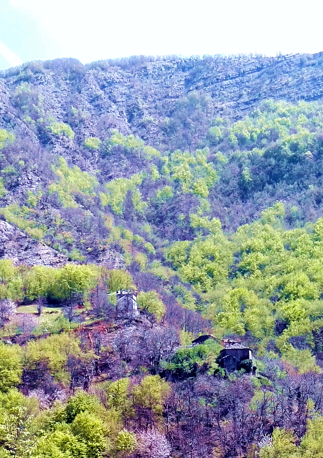 Veduta di Chioapporato. A sinistra più in alto la chiesa e il cimitero.